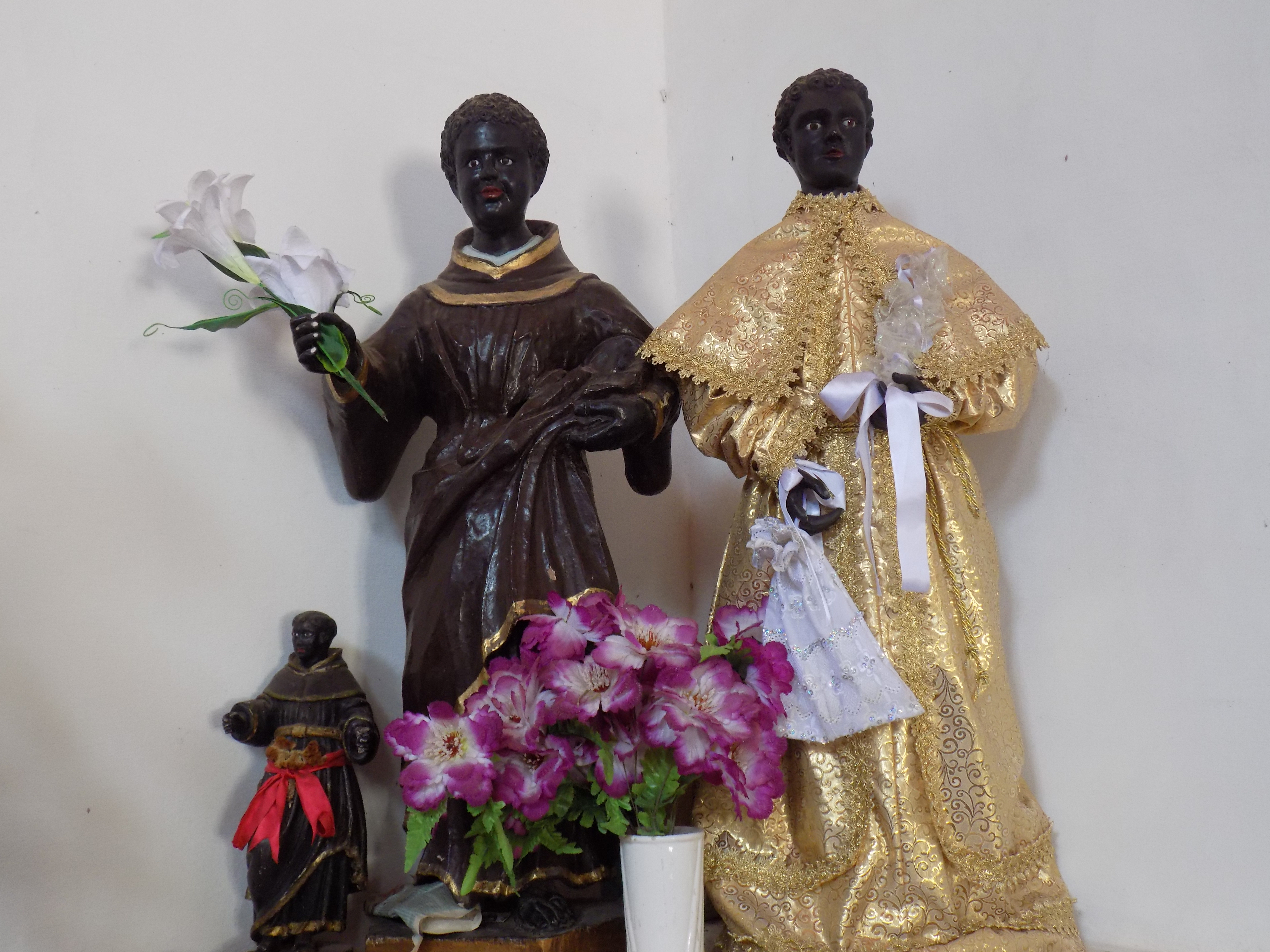 Alcântara, MA: conjunto arquitetônico e urbanístico